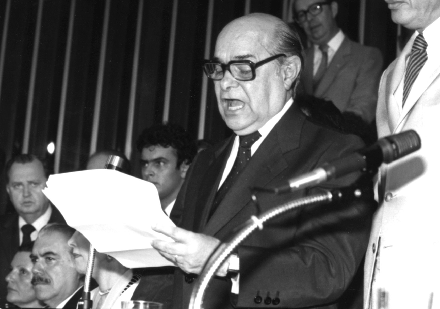 Discurso de Tancredo Neves após eleição indireta para Presidente da República, Colégio Eleitoral, plenário da Câmara dos Deputados. Na véspera da posse, em 14 de março, Tancredo seria internado e Sarney, o vice, assumiria o cargo. Depois de sete cirurgias, Tancredo Neves morreu no dia 21 de abril em São Paulo. Data: 15/01/1985. Foto: Célio Azevedo